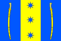 Флаг Бесскорбненского сельского поселения, Краснодарский край, Россия.